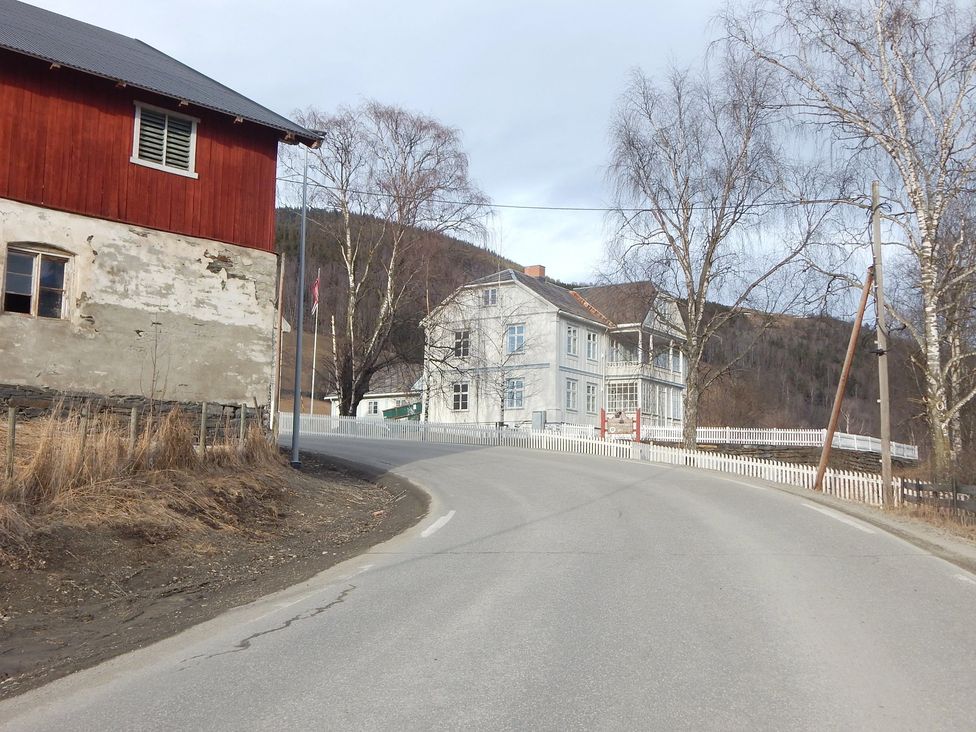 Hundorpgeilen (primær fylkesvei 256) passerer Dale-Gudbrands gård